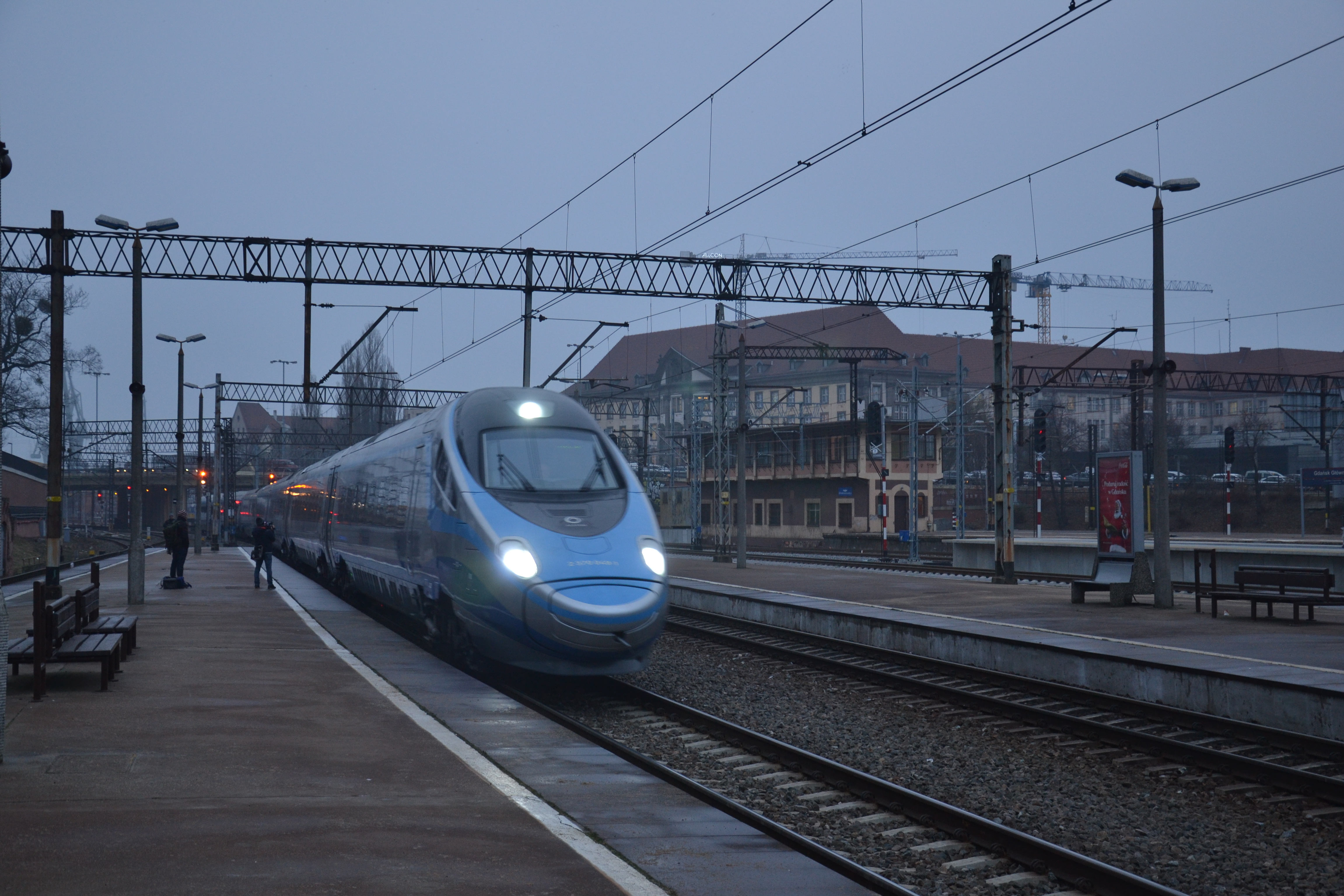 ED250-007 (Pendolino) wjeżdża na peron 1 dworca Gdańsk Główny.